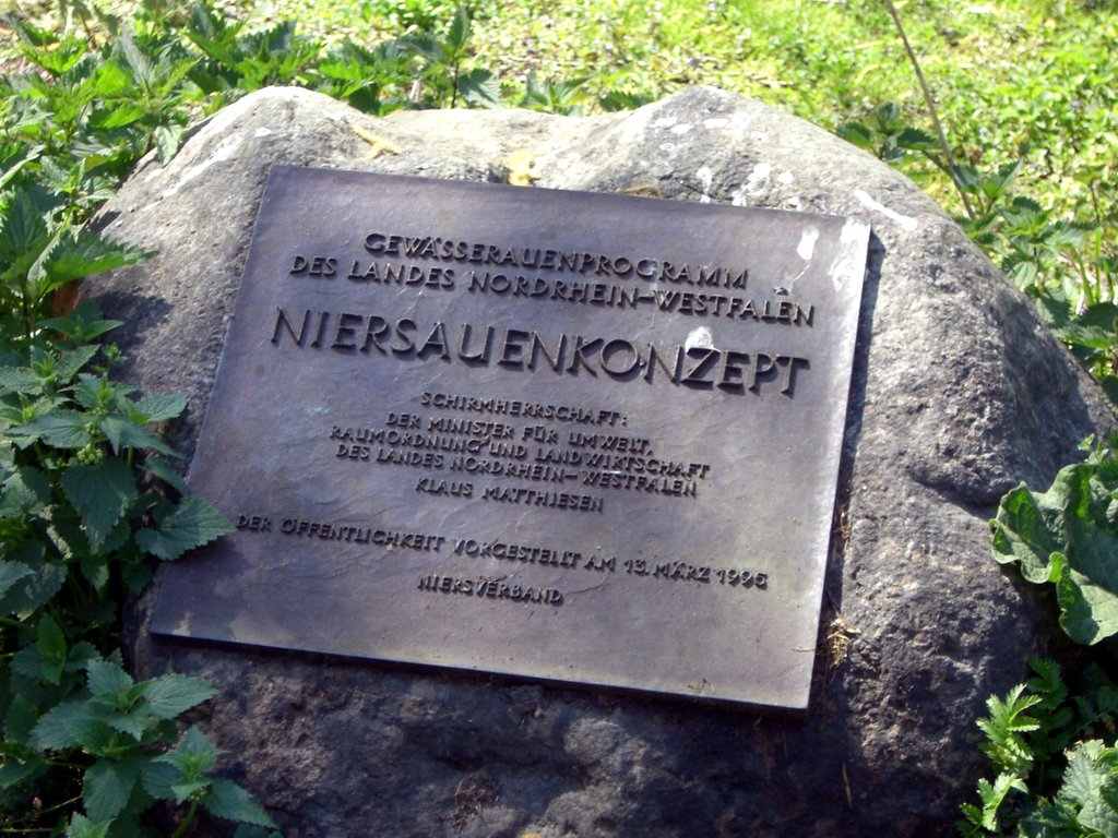 Metalltafel am Niersufer.